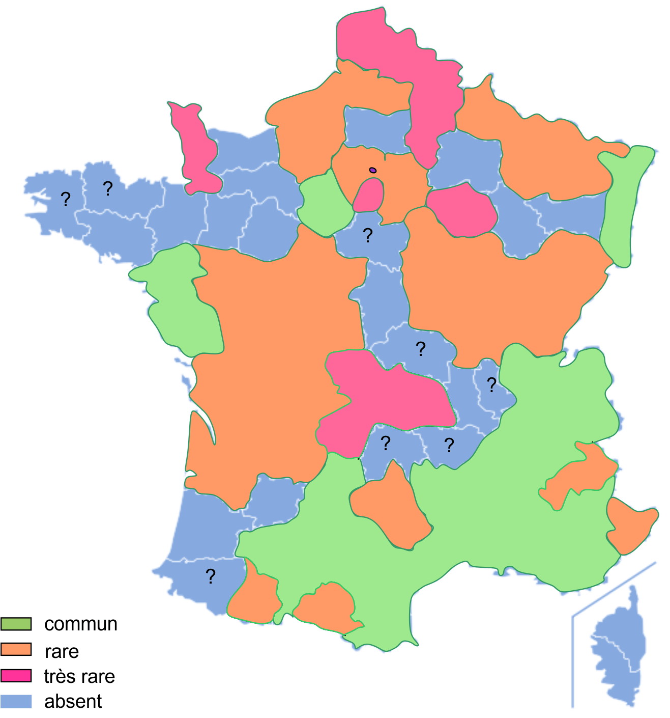 Carte de répartition et d'abondance de Pelophylax ridibundus d'après Duguet et al Les Amphibiens Parthénope, 2003